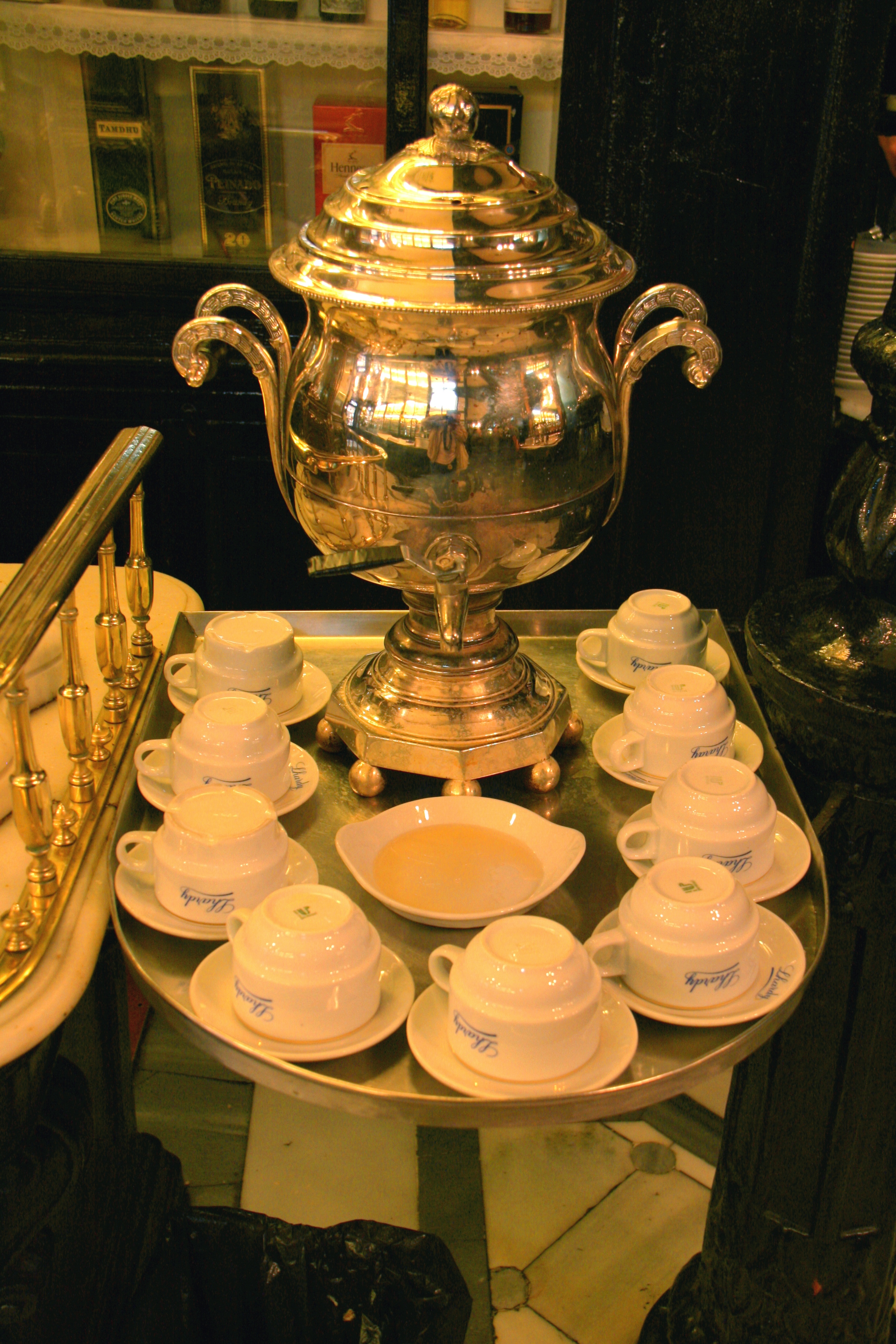 Samovar de Lhardy (Madrid)